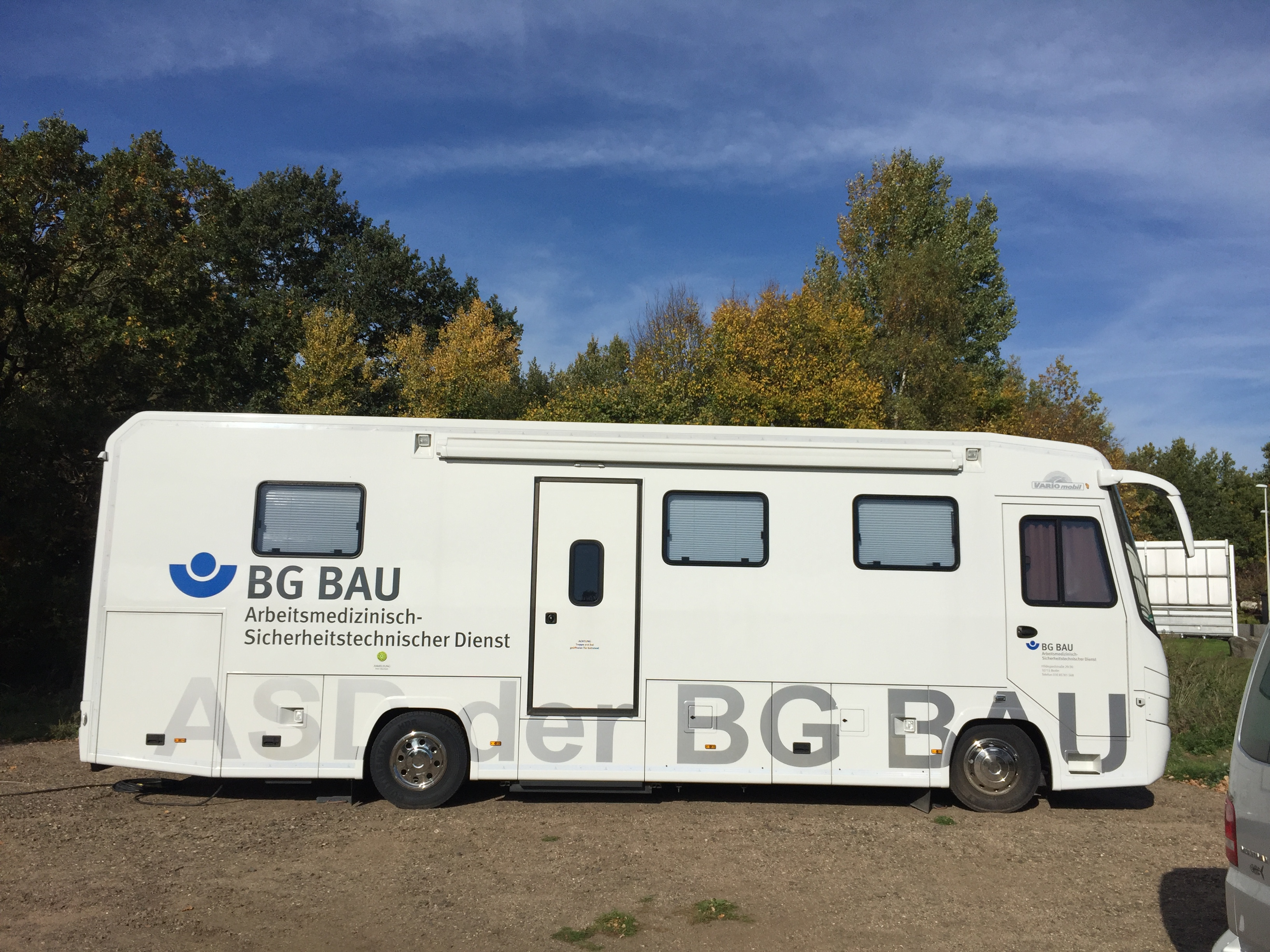 Beratungstruck der Bau-BG